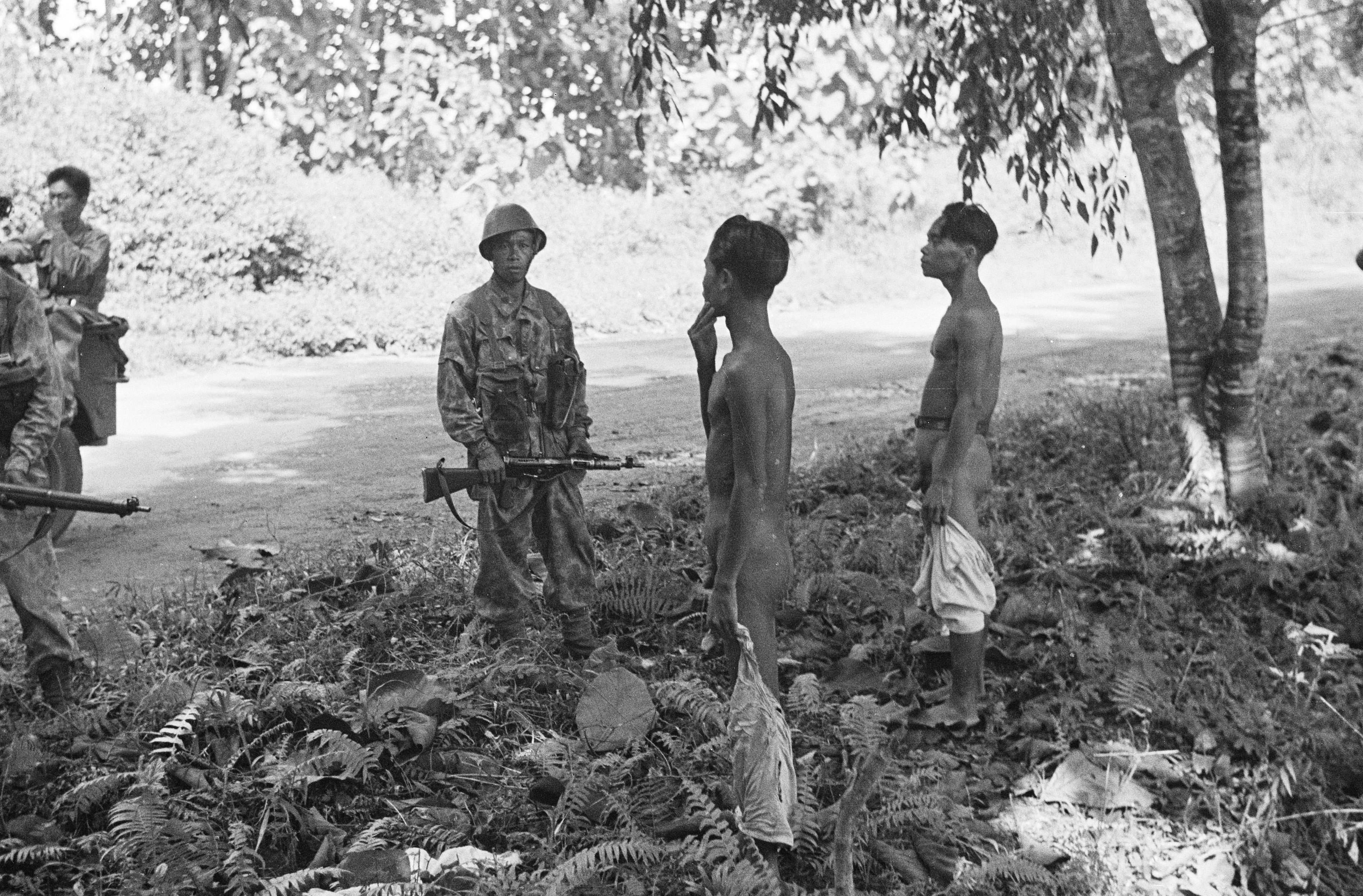 Collectie / Archief : Fotocollectie Dienst voor Legercontacten Indonesië Reportage / Serie : [DLC] Actie Medan (III) Beschrijving : Twee naakte Indonesische mannen worden onder schot gehouden door twee KNIL militairen Annotatie : DjK Datum : juli 1947 Locatie : Indonesië, Nederlands-Indië, Sumatra Fotograaf : Fotograaf Onbekend / DLC Auteursrechthebbende : Nationaal Archief Materiaalsoort : Negatief (zwart/wit) Nummer archiefinventaris : bekijk toegang 2.24.04.02 Bestanddeelnummer : 7407